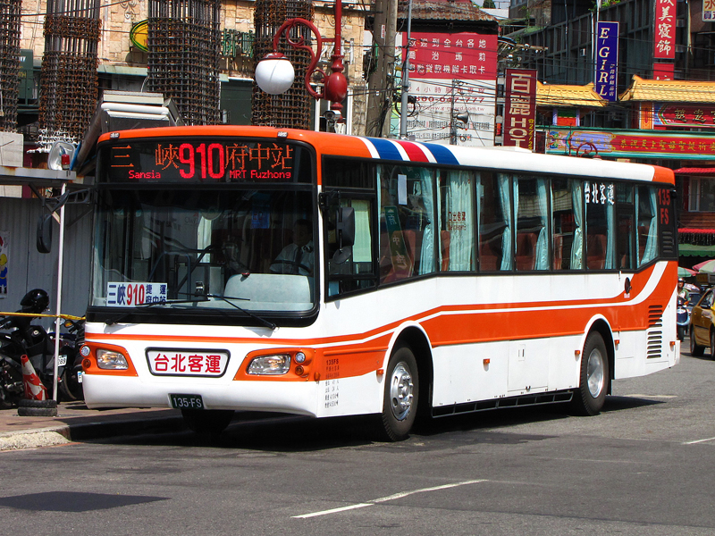 台北客運2010年日野RK8JRSA單門大客車135-FS。